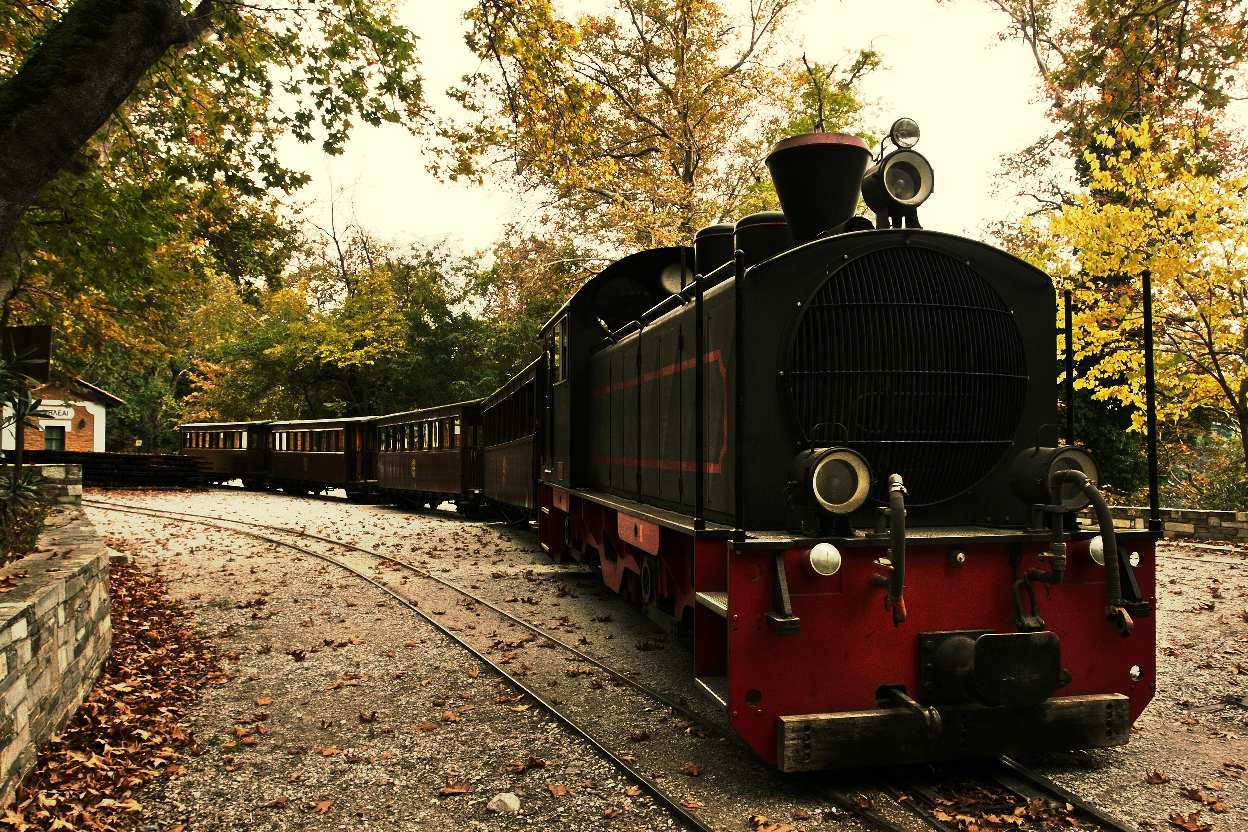 Τρενάκι Πηλίου«Τρενάκι Πηλίου»